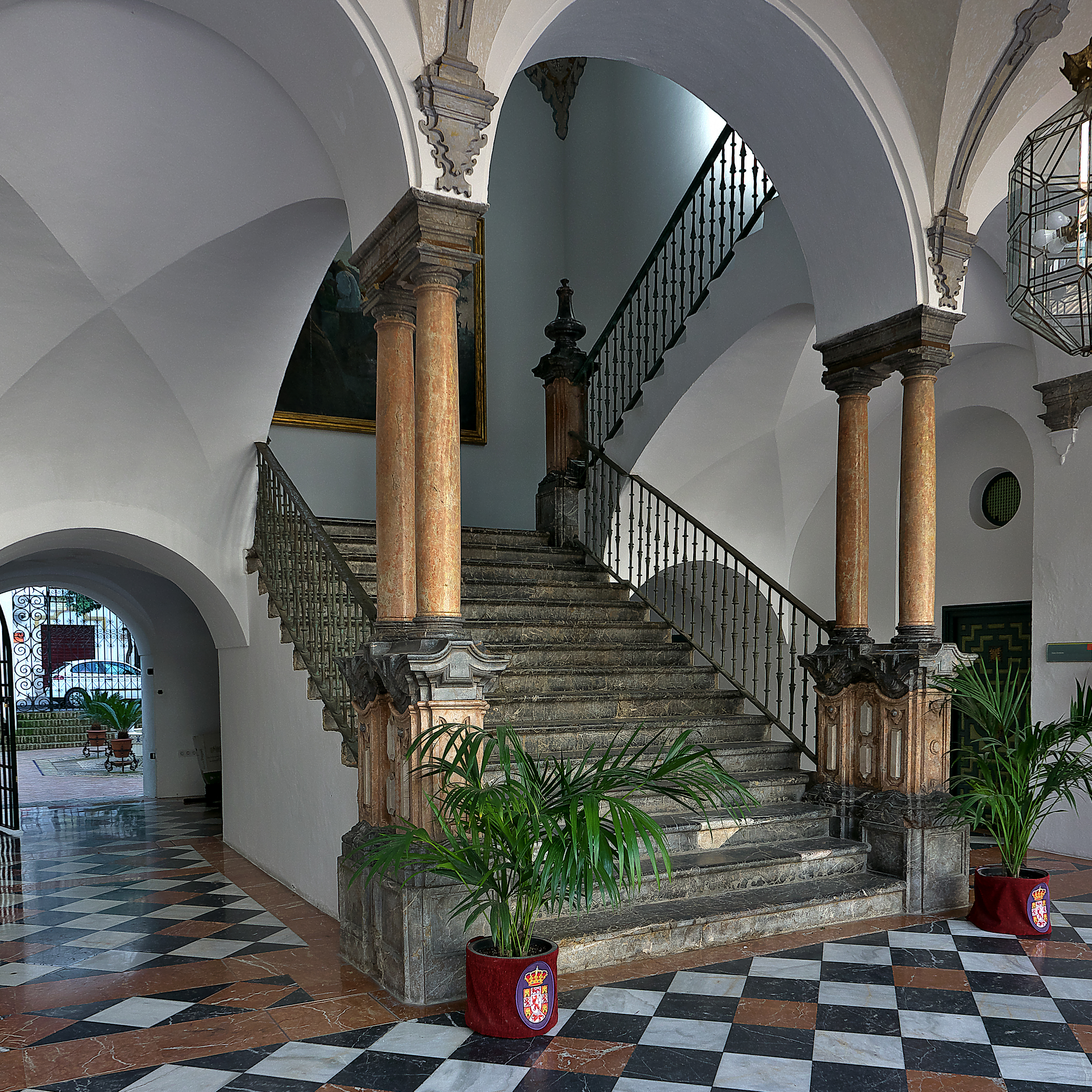 Escalera (h. 1752) del claustro principal del Convento de la Merced, Córdoba, atribuída a Alonso Gómez de Sandoval.